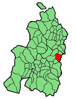 aipaturiko udalerriaren kokapena Nafarroa Beherean